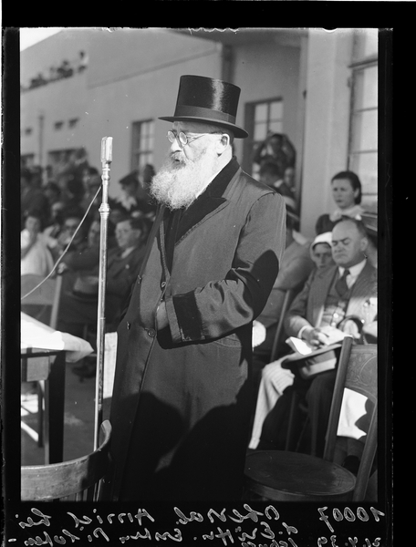 טקס הסיום של קורס הטיס העברי הראשון בלוד, הנציב העליון, סיר הרולד מק מייקל, מעניק אותות לבוגרי המחזור הראשון של בית הספר העברי לטיסה. משמאל, נראים הרבנים הראשים, הרב משה אביגדור עמיאל והרב בן ציון מאיר חי עוזיאל זצ"ל